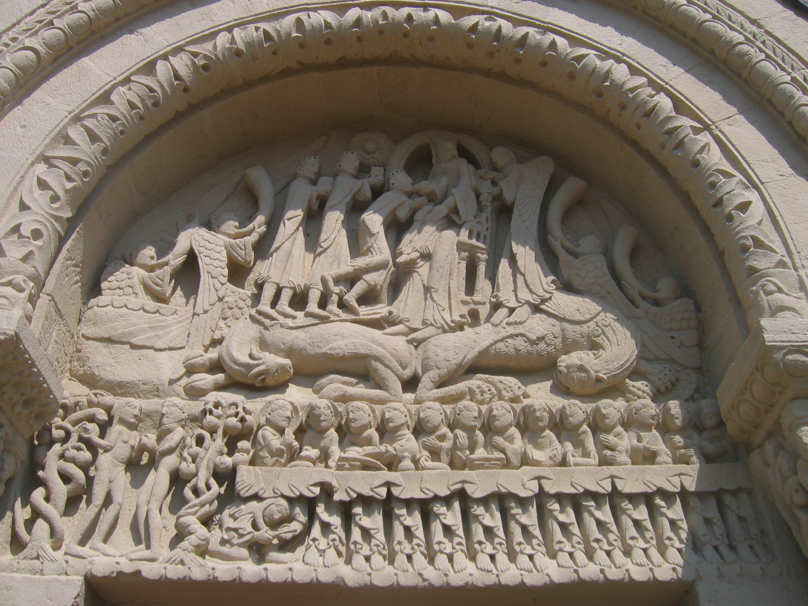 Portail et linteau (Église Ste-Marie-Madeleine de Neuilly en Donjon)